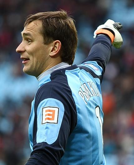 Сергей Рыжиков на матче ЦСКА - Рубин